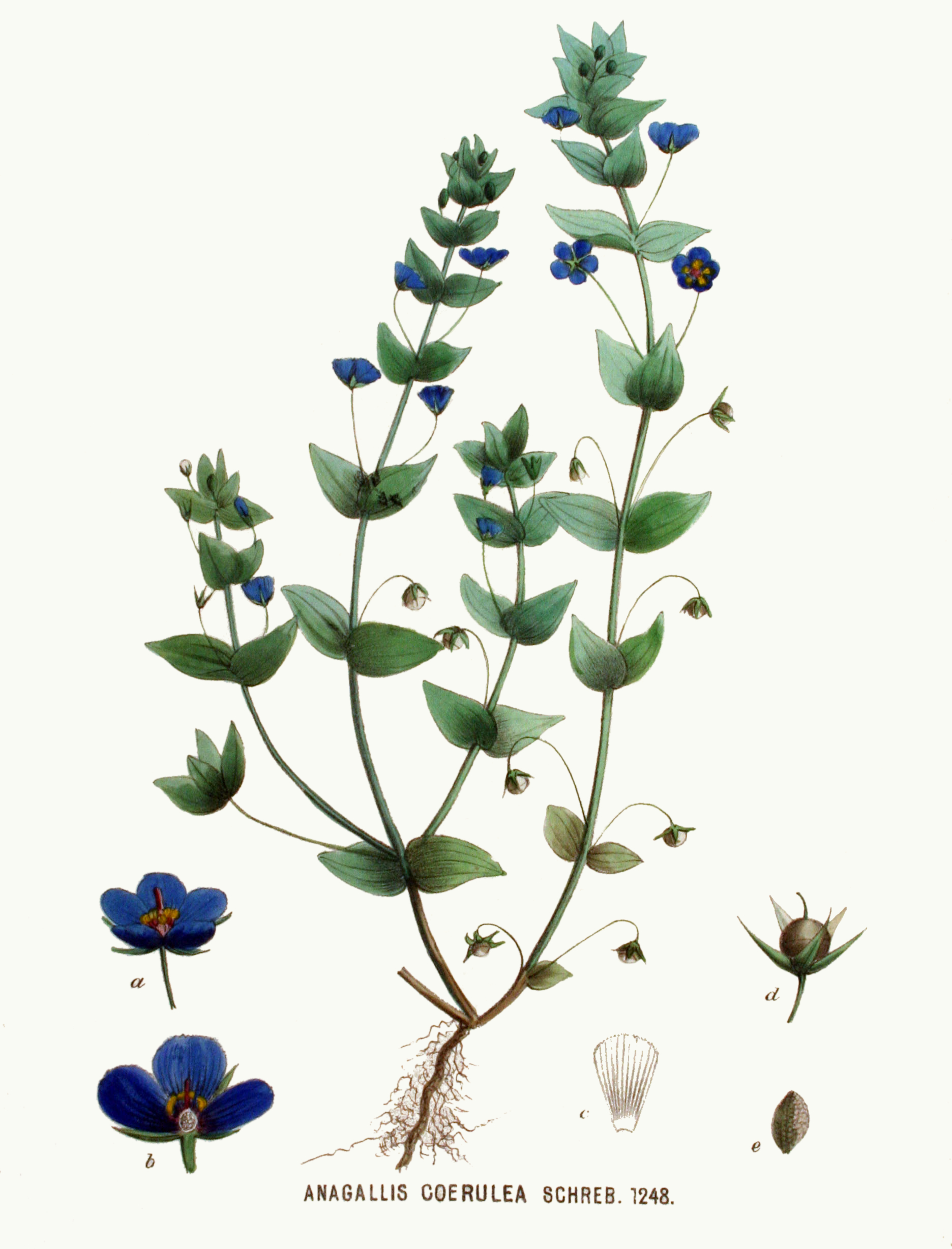 Lysimachia foemina (Mill.) U. Manns & Anderb. (Syn. Anagallis foemina Mill., Anagallis coerulea Schreb.)